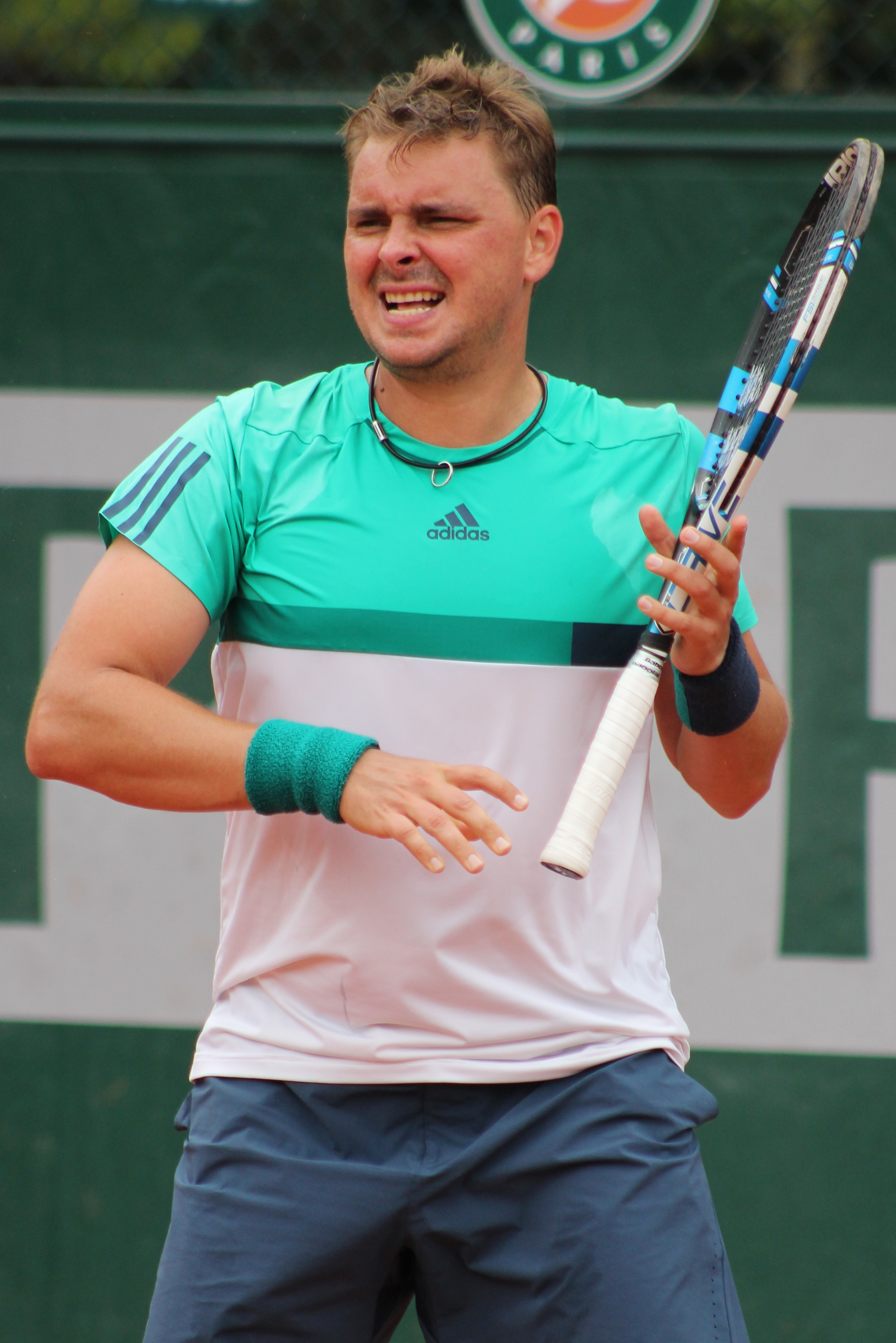 Matkowski RG16